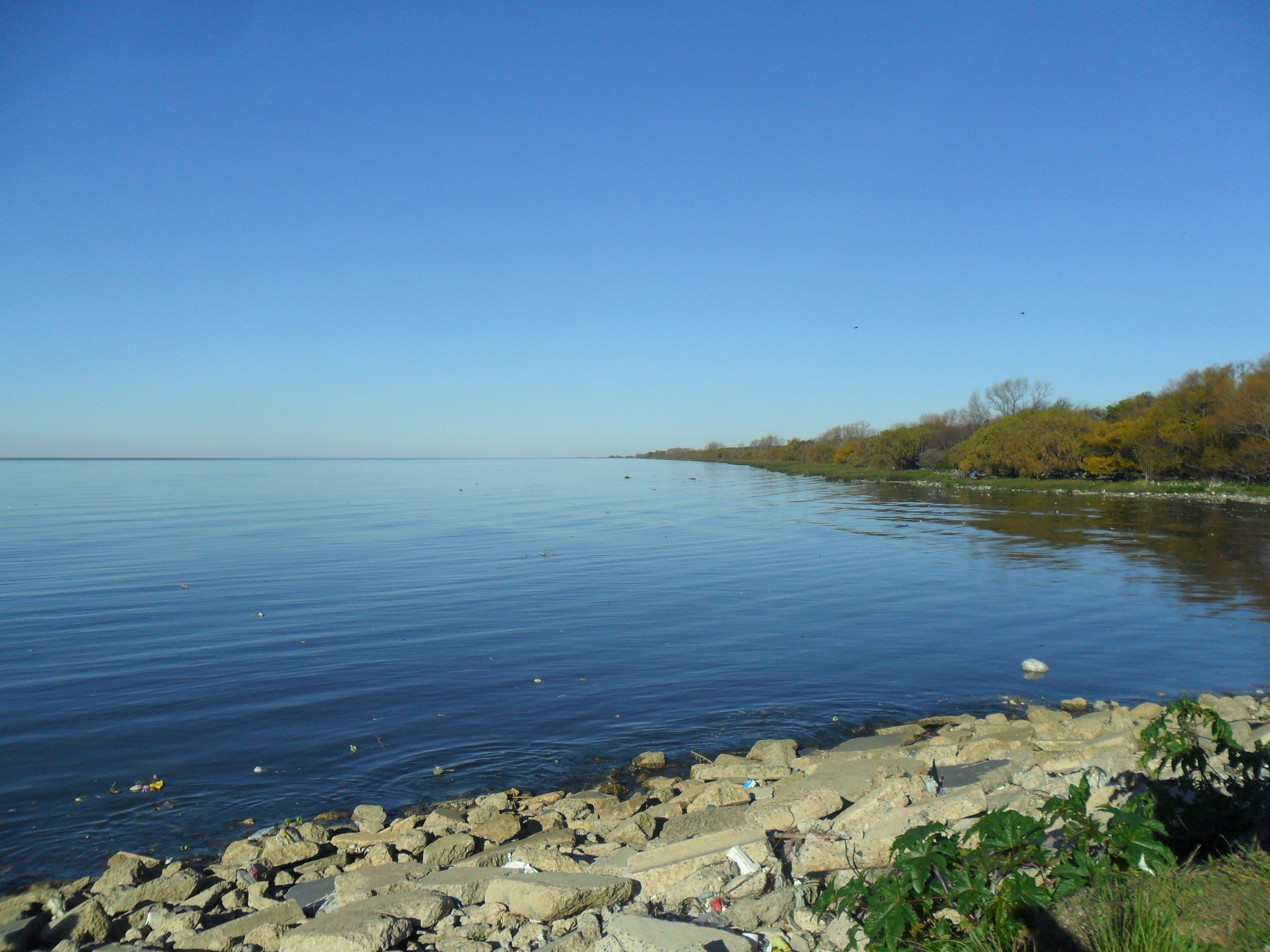 Graciela Canadell, 63 años, UTN FRA, Villa Dominico